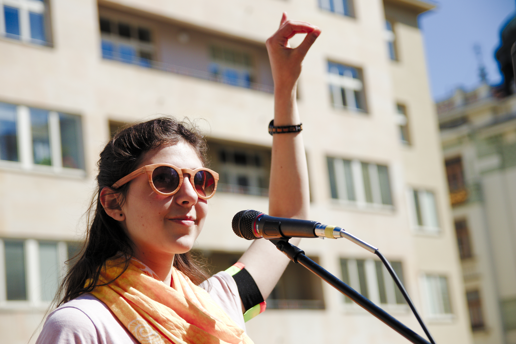 Lucie Smolková School strike for Climate Brno, Czech rep. May 24, 2019 Stredoškolská stávka za klima Brno 24. 5. 2019